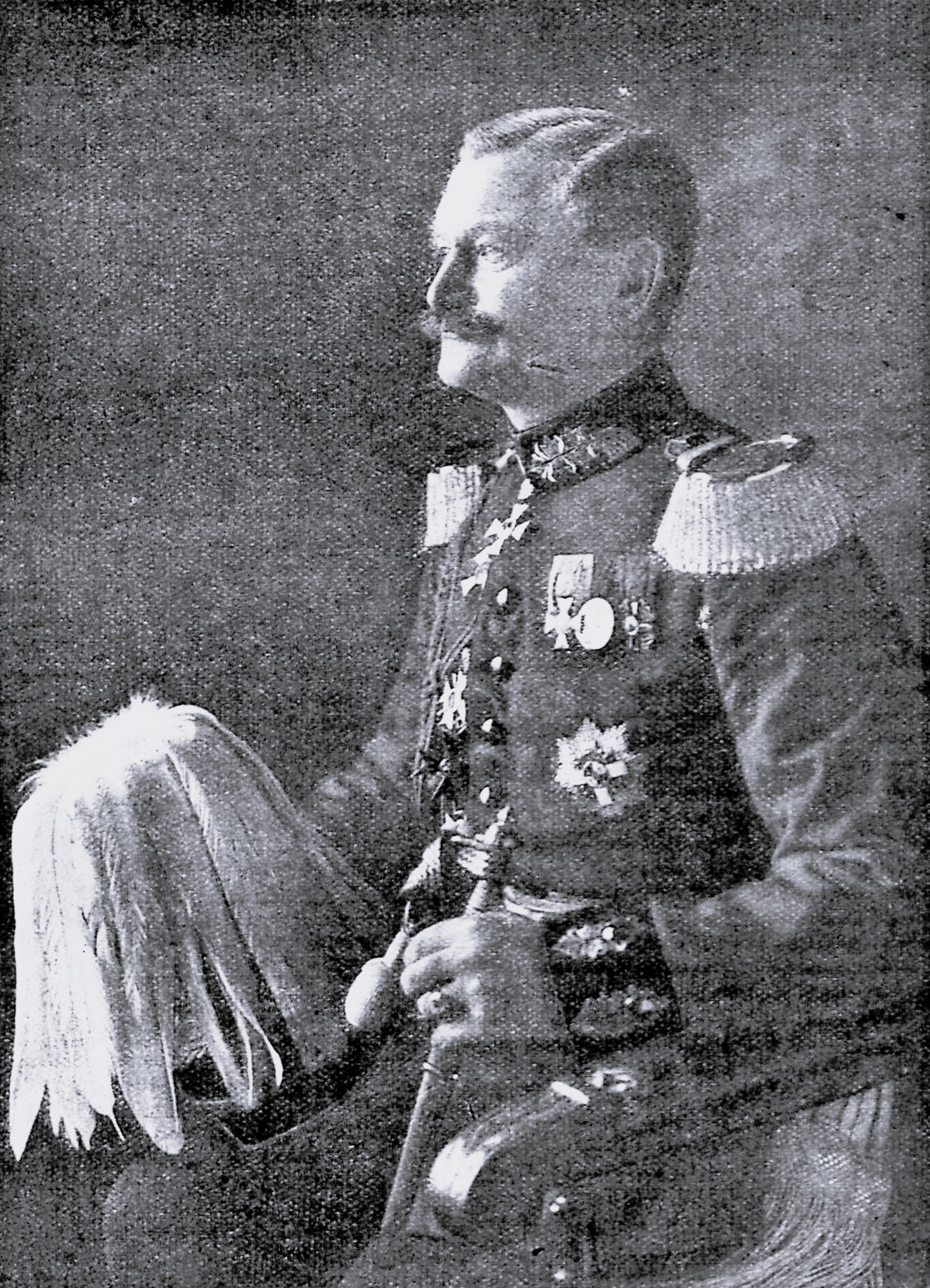 Generalleutnant v. Oidtman, Lübeck.